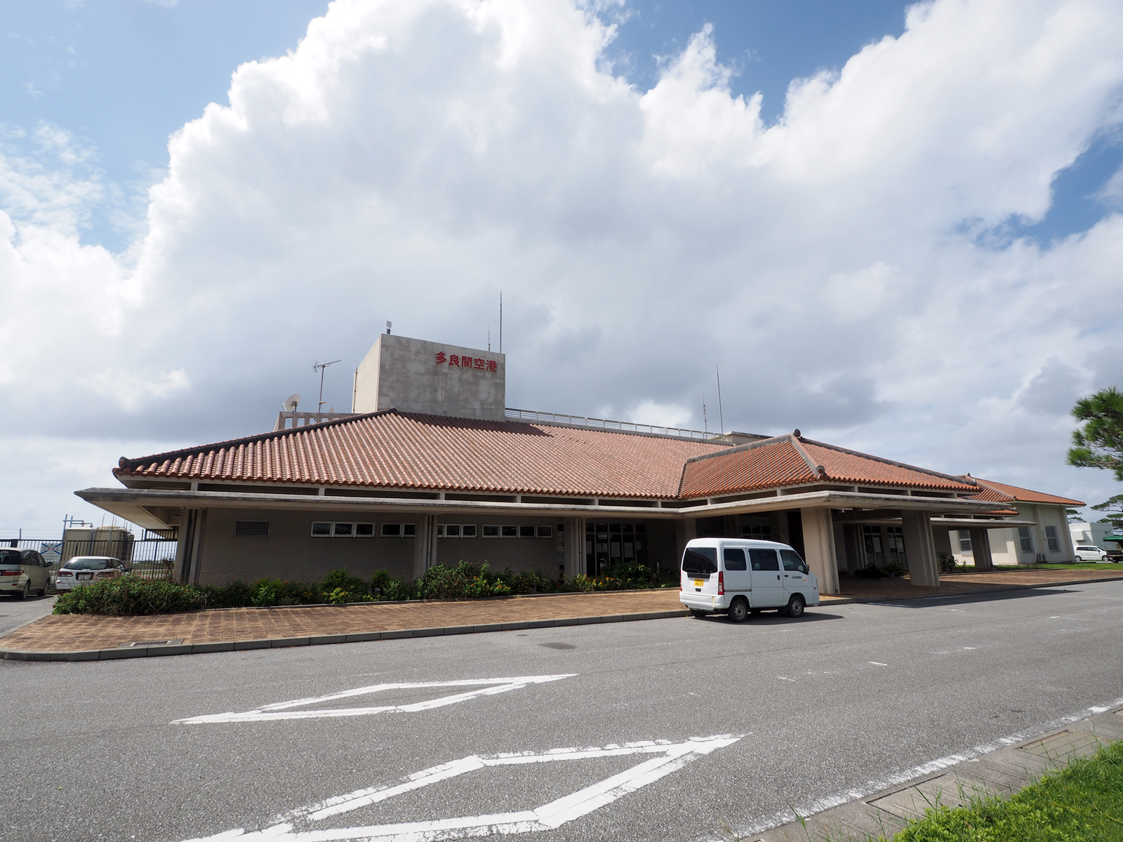 多良間空港ターミナル（沖縄県宮古郡多良間村多良間島）